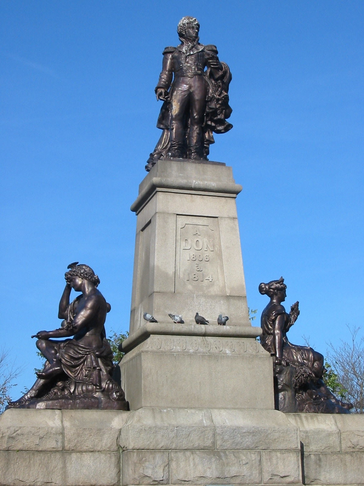 Don Monument, Saint Helier, Jersey